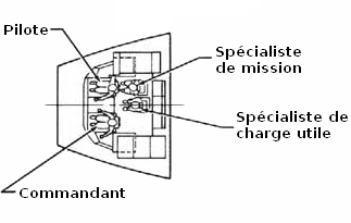 Configuration du poste de pilotage d'une navette spatiale en orbite.